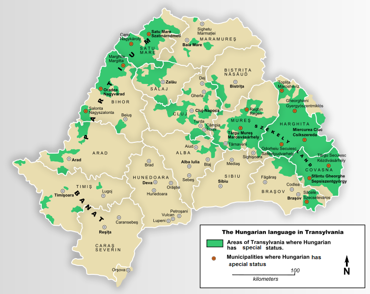 Own work. Add a footnote crediting me if you intend to post this map. Romanian: Limba maghiară în Transilvania